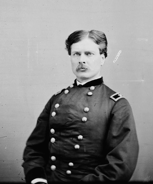 George Alexander Forsyth